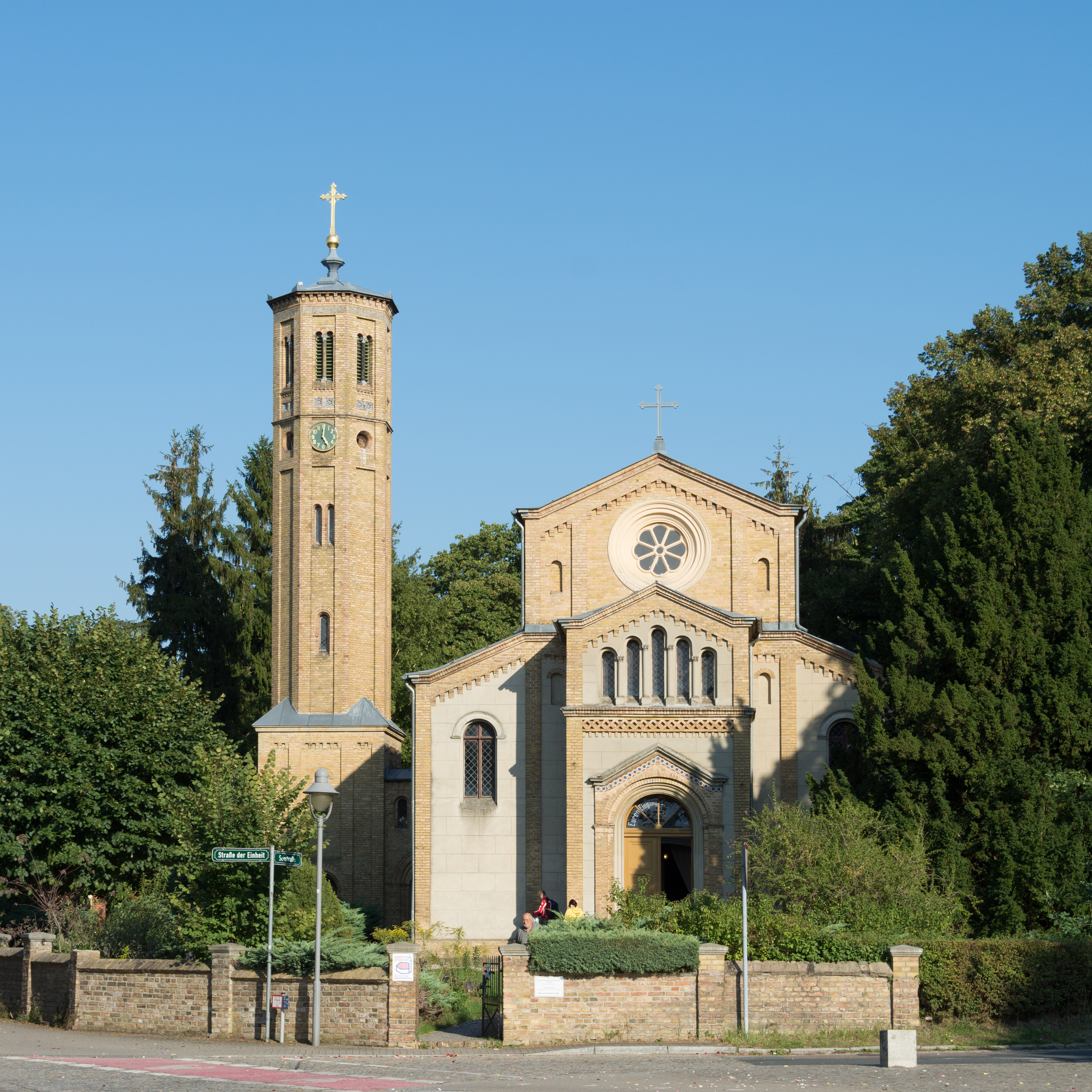 Kirche in Caputh (Baumeister: Friedrich August Stüler) (Gemeinde Schwielowsee, Landkreis Potsdam Mittelmark, Brandenburg). Diese Kirche ist ein Baudenkmal in Brandenburg mit der Nummer 09190123.